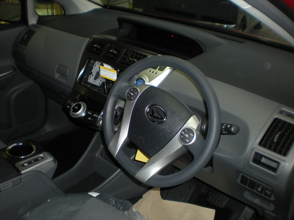 ダイハツ・メビウス